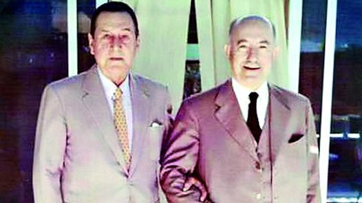 El mandatario Juan Domingo Perón junto al gobernador correntino Julio Romero.